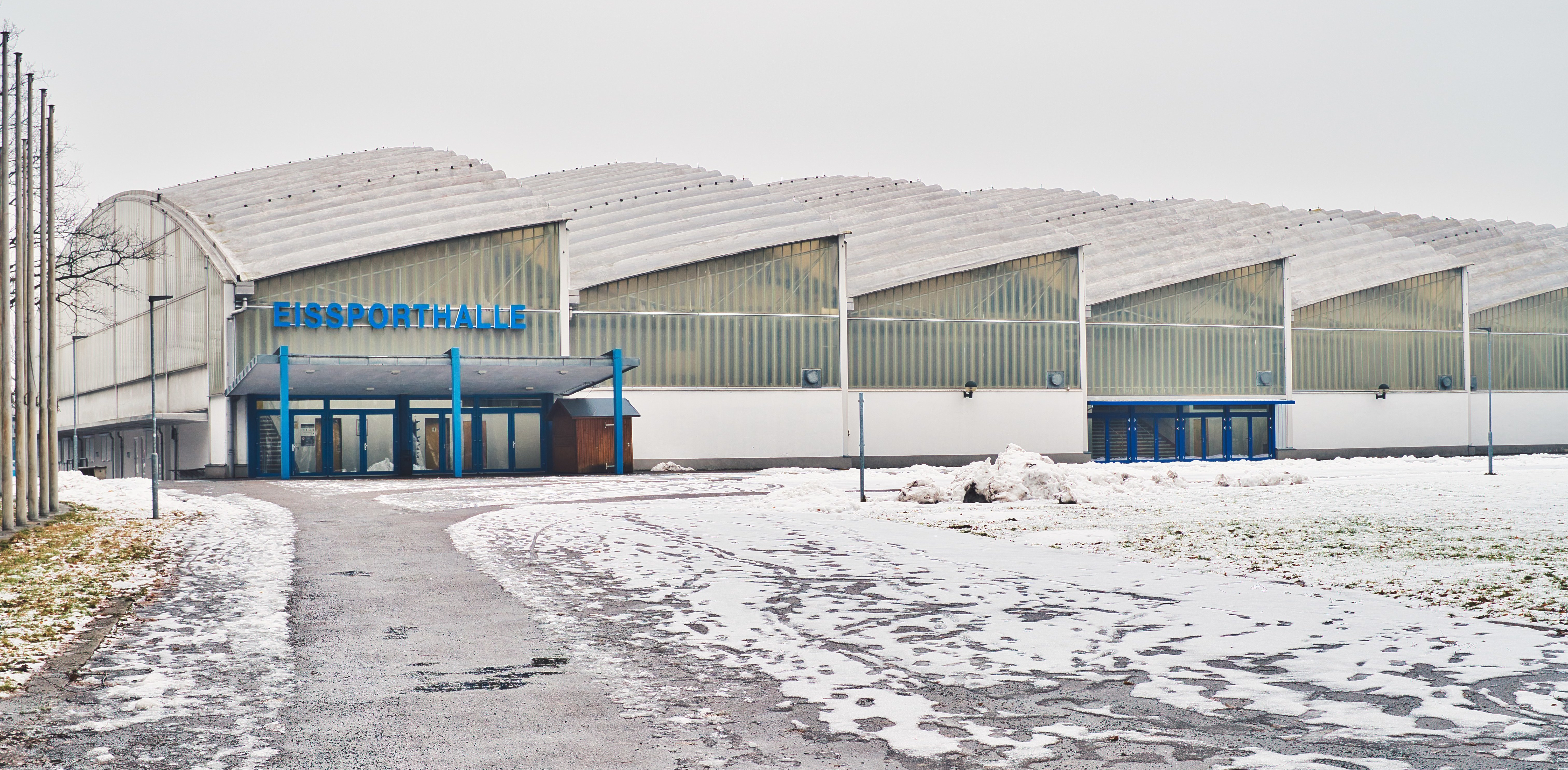 Eishalle im Eissportzentrum , Chemnitz